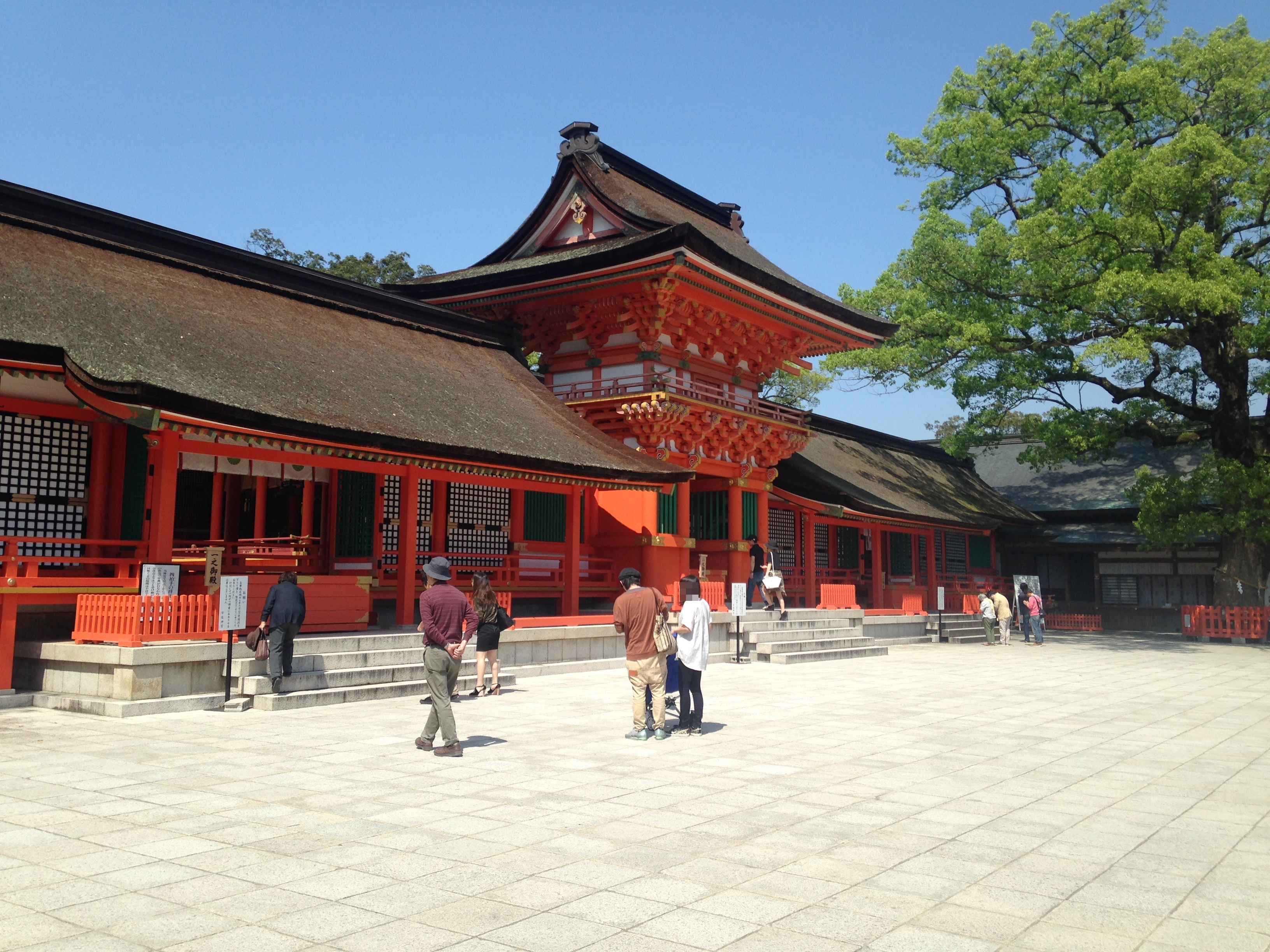 宇佐神宮・上宮の南中楼門